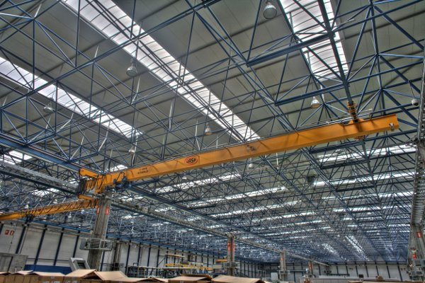 Nave de Industria de Turbopropulsores (ITP) en Zamudio, Vizcaya, España